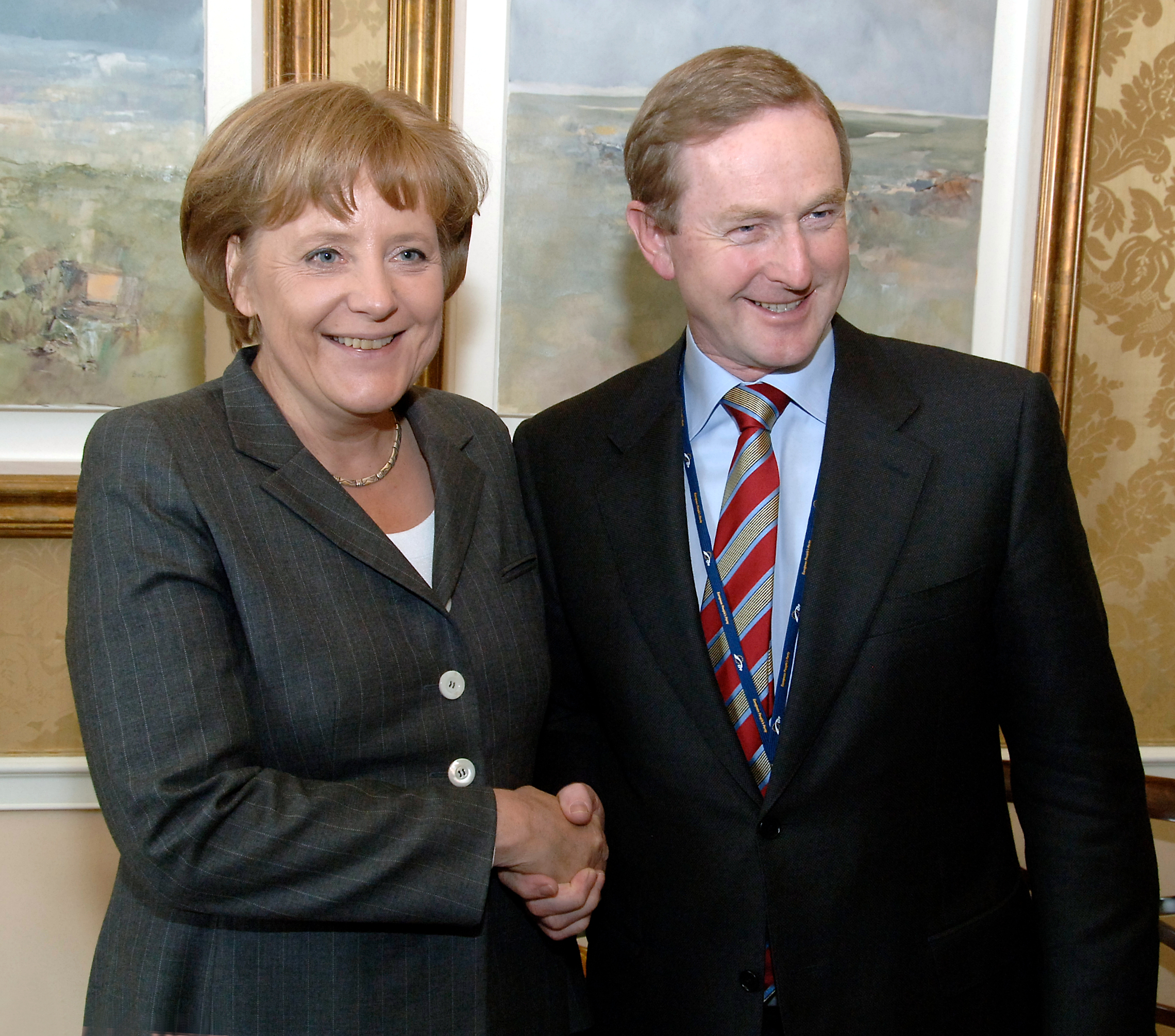 EPP LEADERS MEET IN DUBLIN 14 April 2008